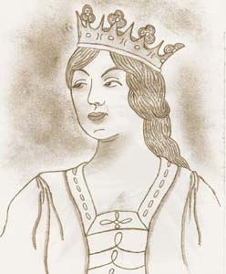 Rainha de Portugal de Direito